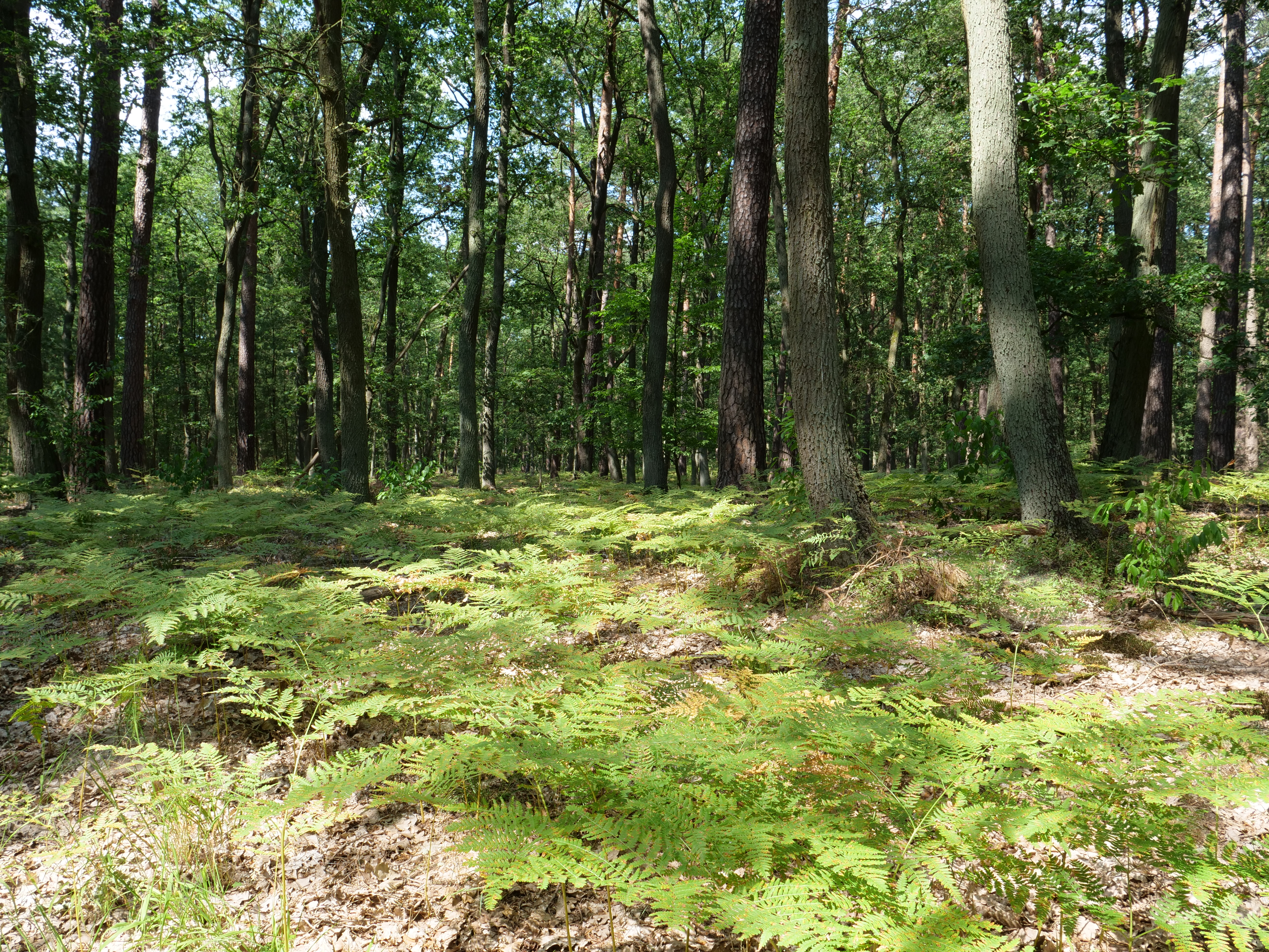 Der Spandauer Forst im Juli 2018.